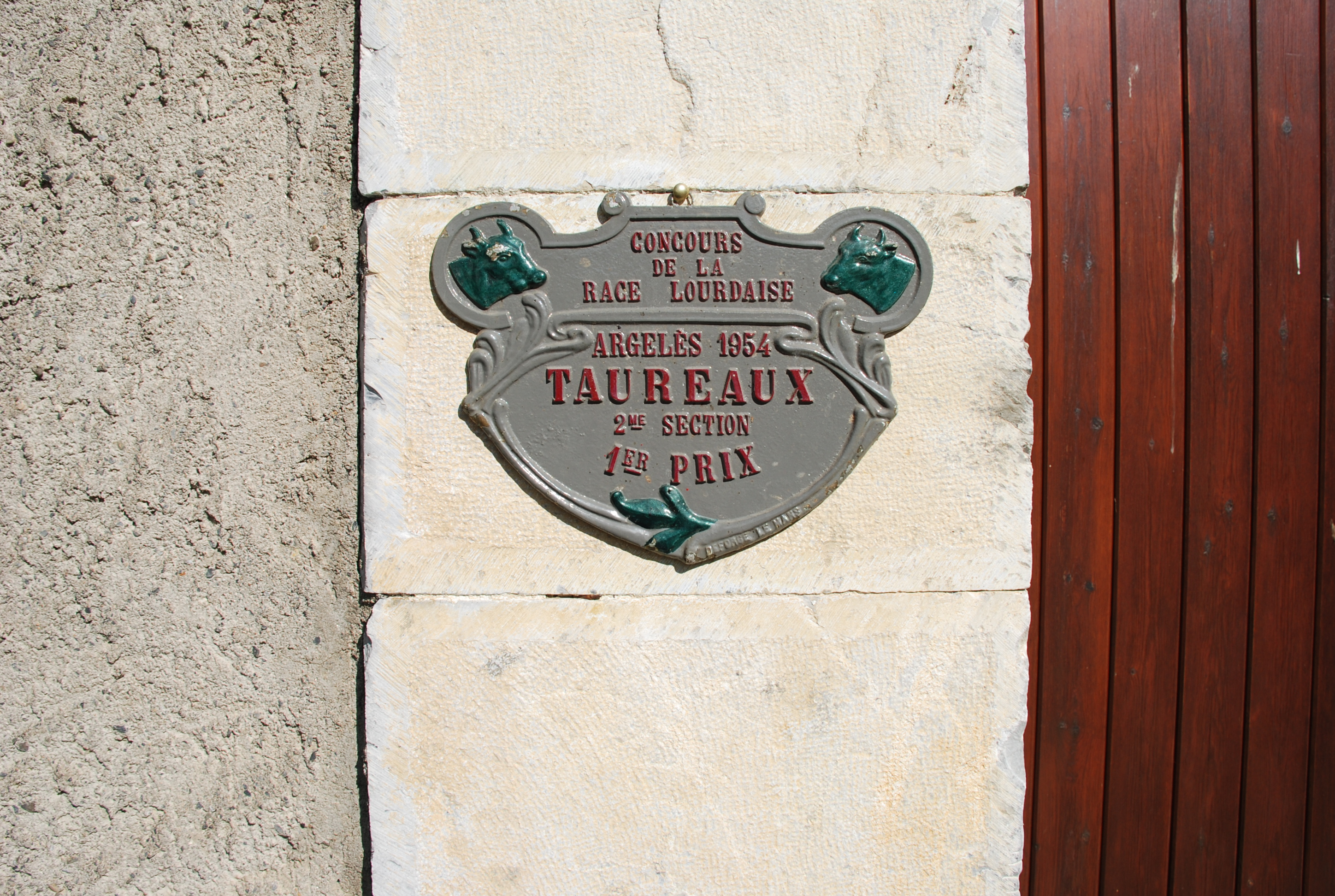 Plaque attestant un premier prix attribué à un taureau de race lourdaise en 1954, lors d'un concours d'animaux à Argeles-Gazost. Plaque originaire de la maison Moura, à Lézignan, près de Lourdes, où se pratiquait autrefois la monte publique bovine et porcine.